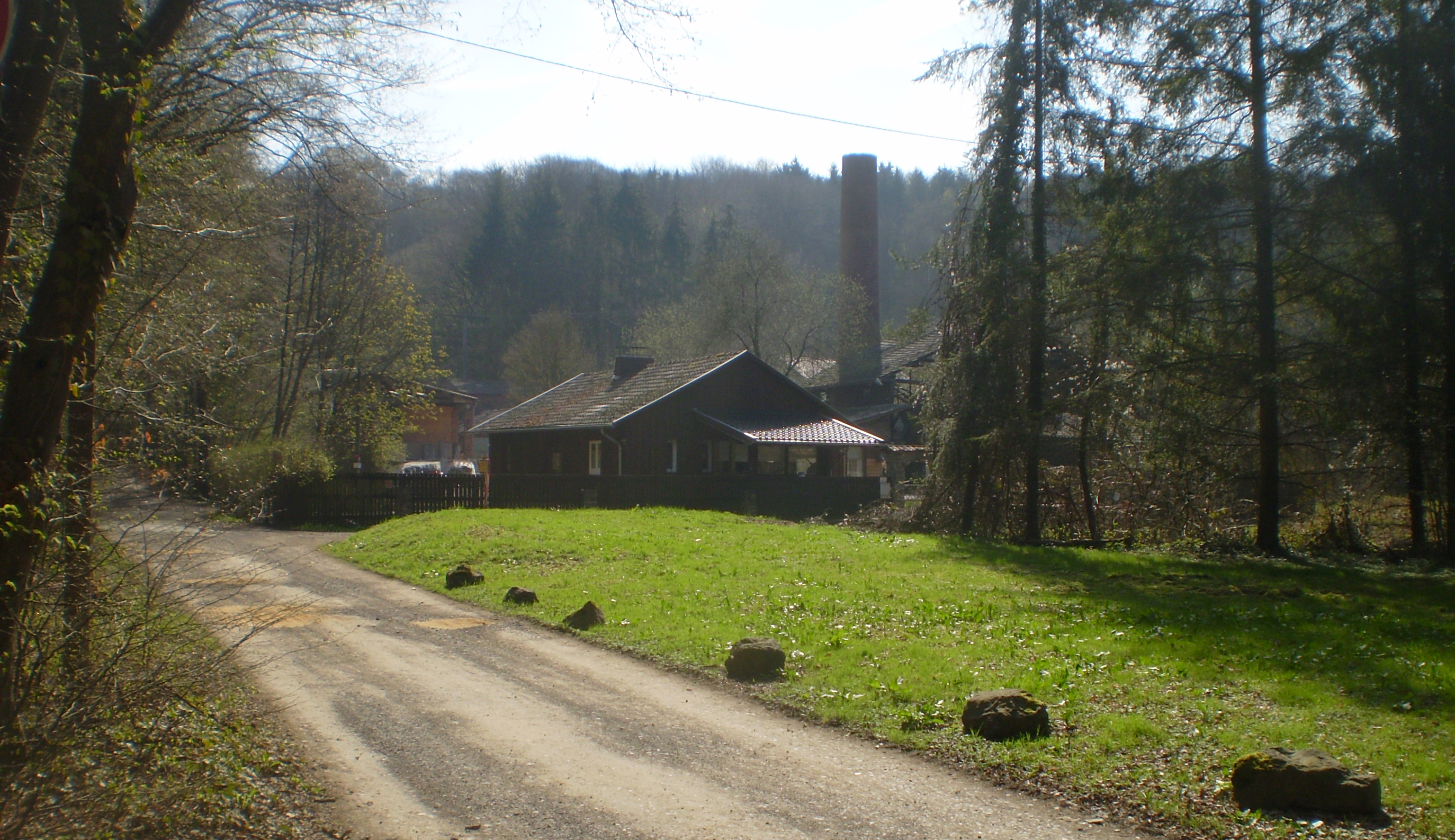 Wohnplatz Häusergruppe Ziegelei mit ehemaligem Schmelzofen, Rheinbreitbach